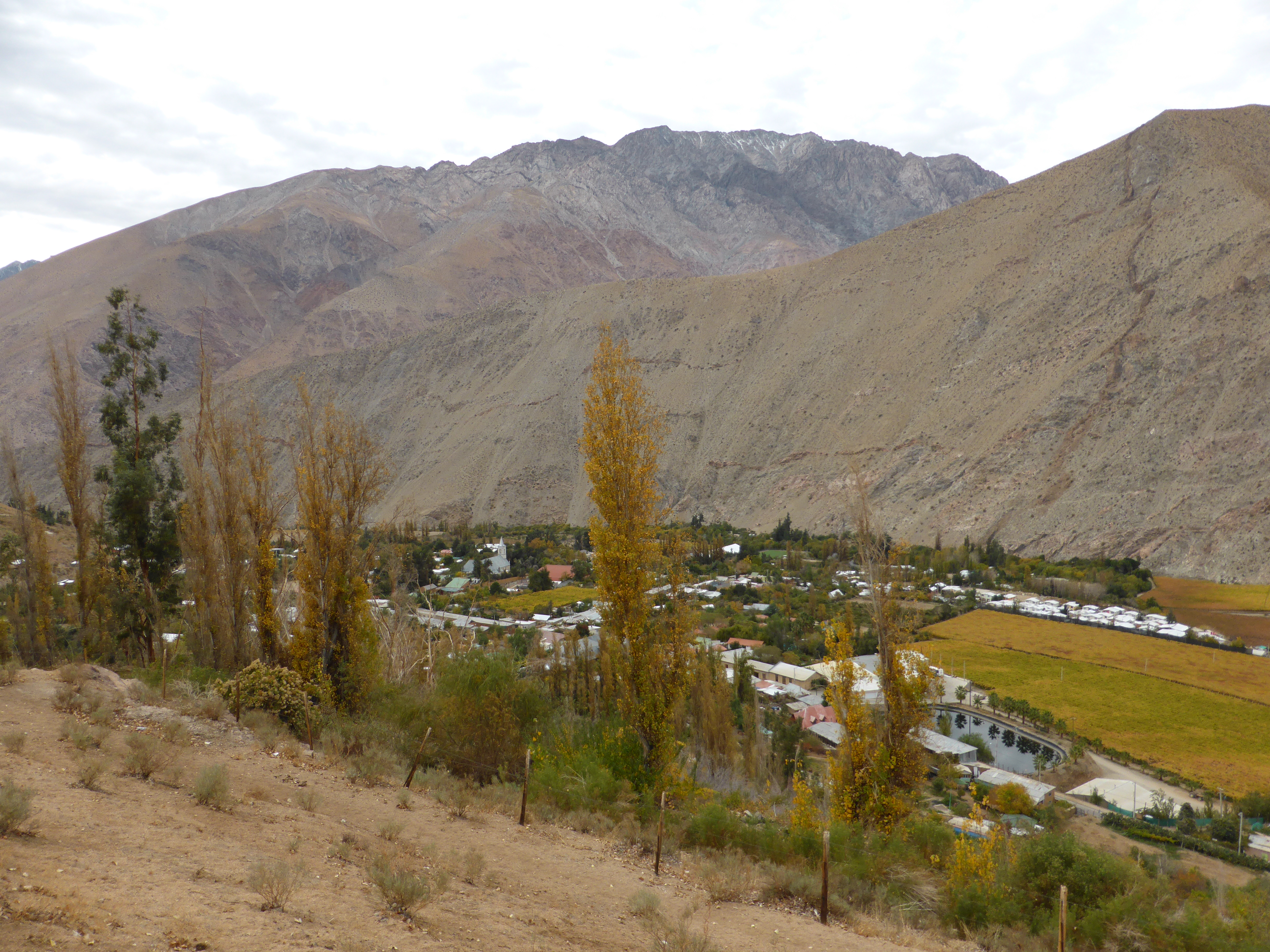 Vista general del pueblo de Pisco Elqui, en el Valle de Elqui, desde una ladera de un cerro. Ampliando la foto se logra distinguir la torre de la iglesia.